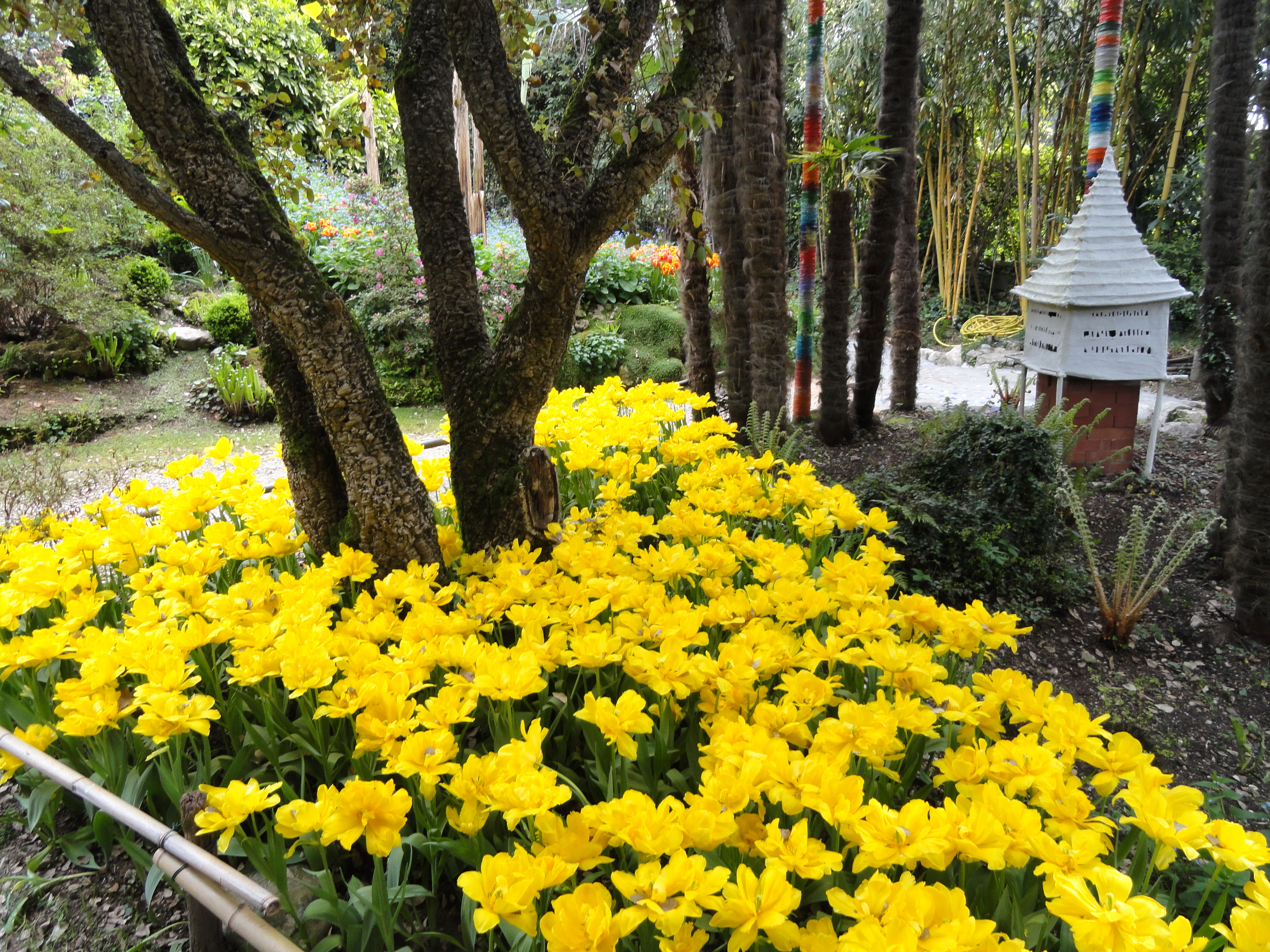 Giardino Botanico Fondazione André Heller, in Gardone Riviera, on Lake Garda, Brescia, Italy.